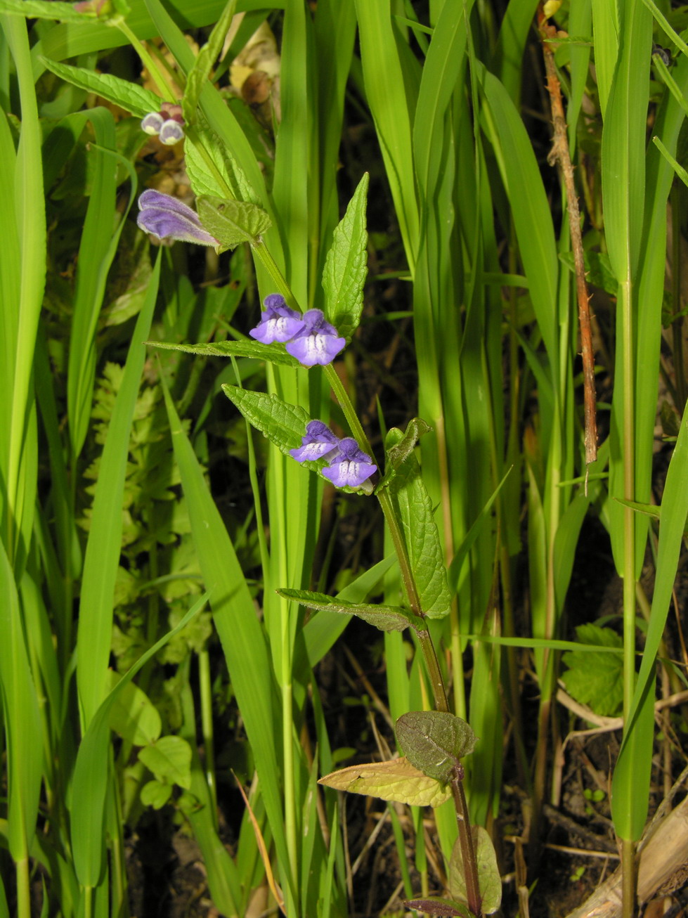 Pelkinė kalpokė (Scutellaria hastifolia) Šeima. Notreliniai (Lamiaceae) Foto: Algirdas, 2006 m. birželio 24 d., Lietuva